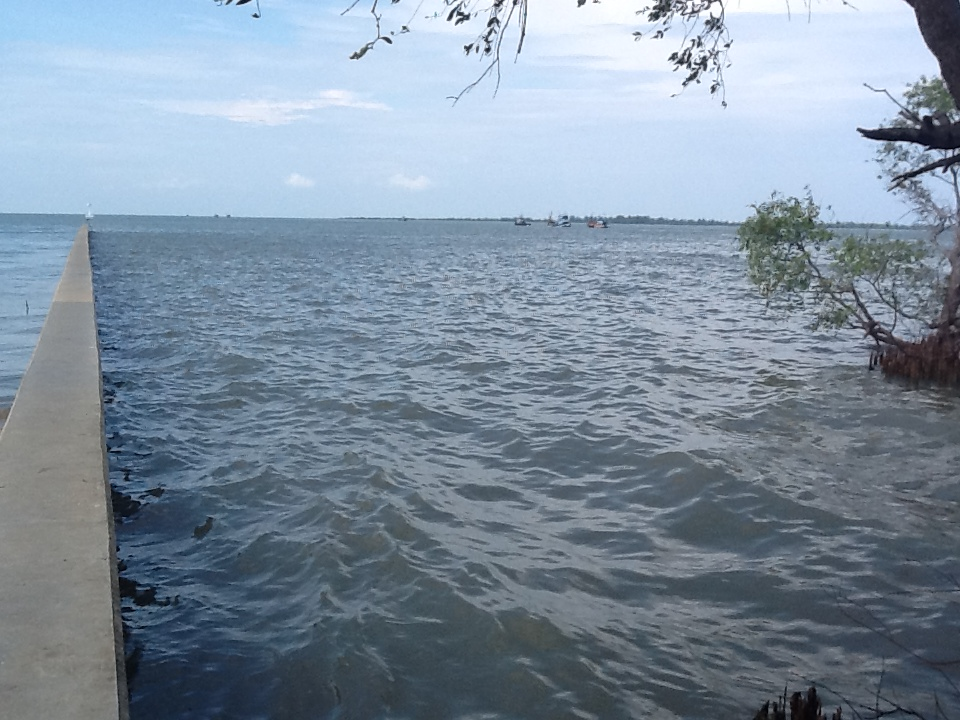 เขื่อนกันทราย และคลื่น ณ.ปากน้ำปัตตานี